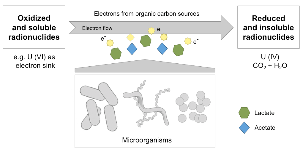 Diagram of direct enzymatic reduction of radionuclides by microorganisms. Adapted from Prakash et al., 2013 and File:Bacteria morphologic forms simplified.svg.